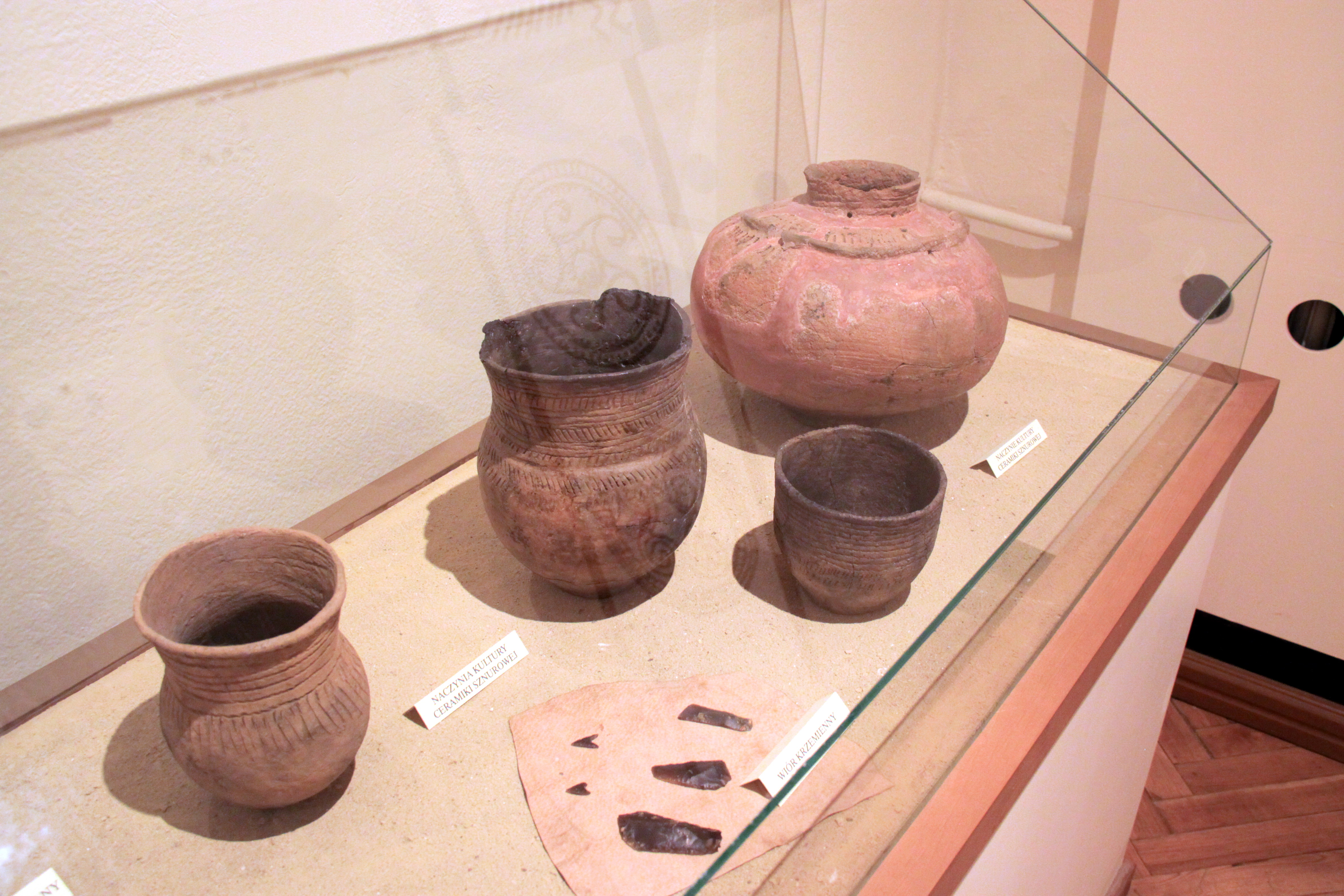 Naczynia kultury ceramiki sznurowej z Pełczysk - ekspozycja w Pałacu Wielopolskich w Chrobrzu.